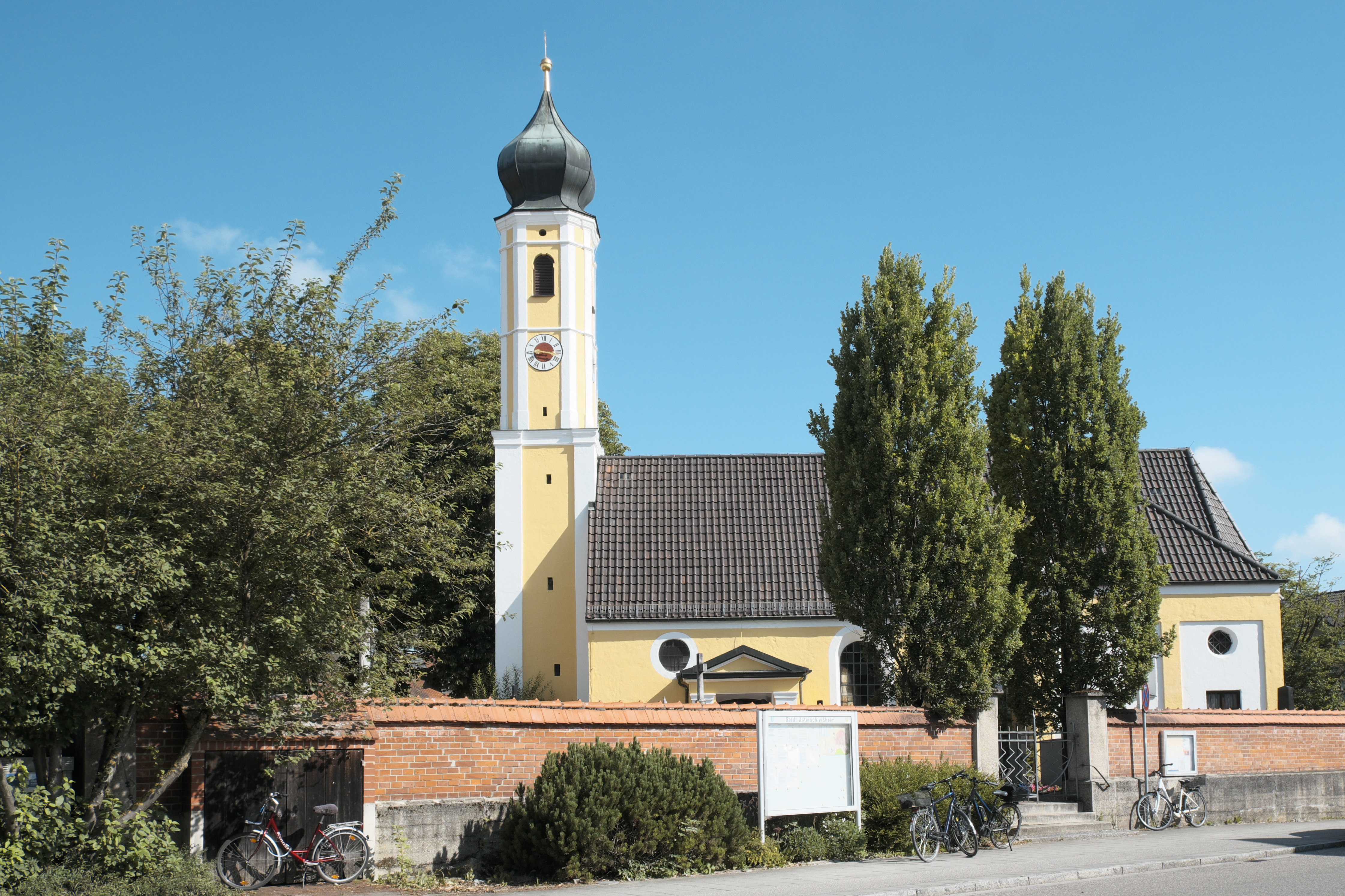 Katholische Nebenkirche Alt St. Ulrich in Unterschleißheim im Landkreis München (Bayern, Deutschland)